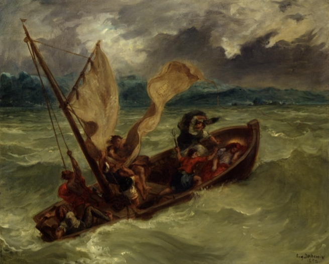 Cristo sul mare di Galilea, Delacroix, 1853, collezione Buhrle